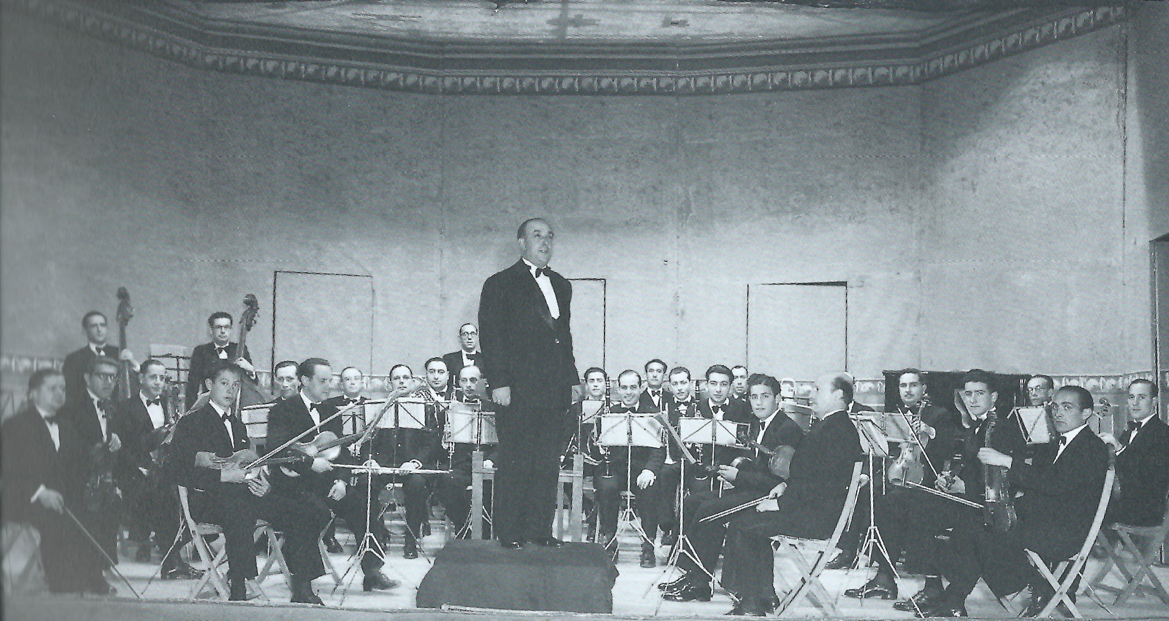 Orquesta Sinfónica de Burgos 1948 Rafael Frühbeck con 15 años como Concertino y Luis Navidad Jorcano como ayuda de concertino.